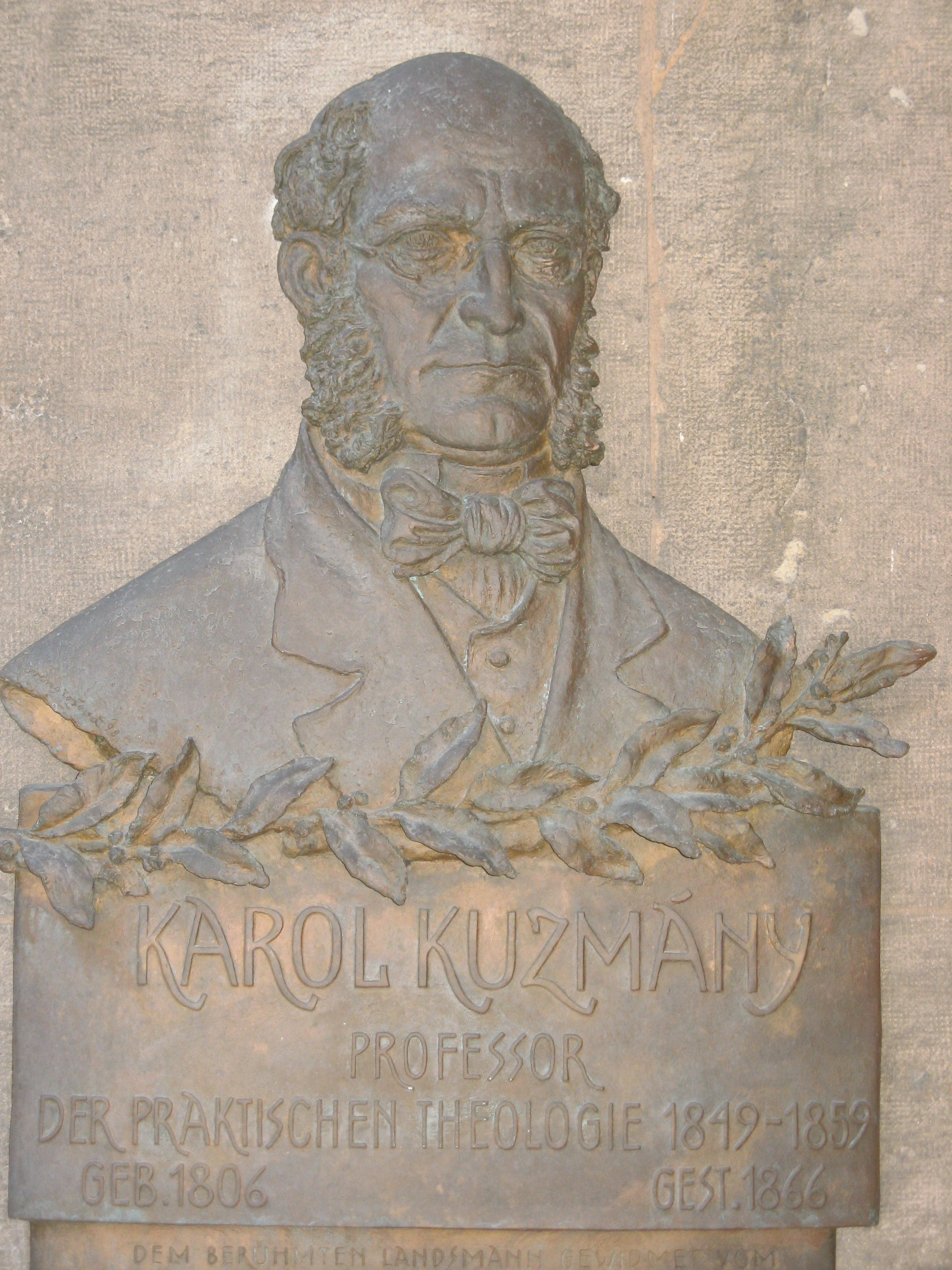 Wien, Universität, Ehrenhalle in den Hofarkaden, Denkmal Karol Kuzmány (laut Dehio Wien I von 1998)